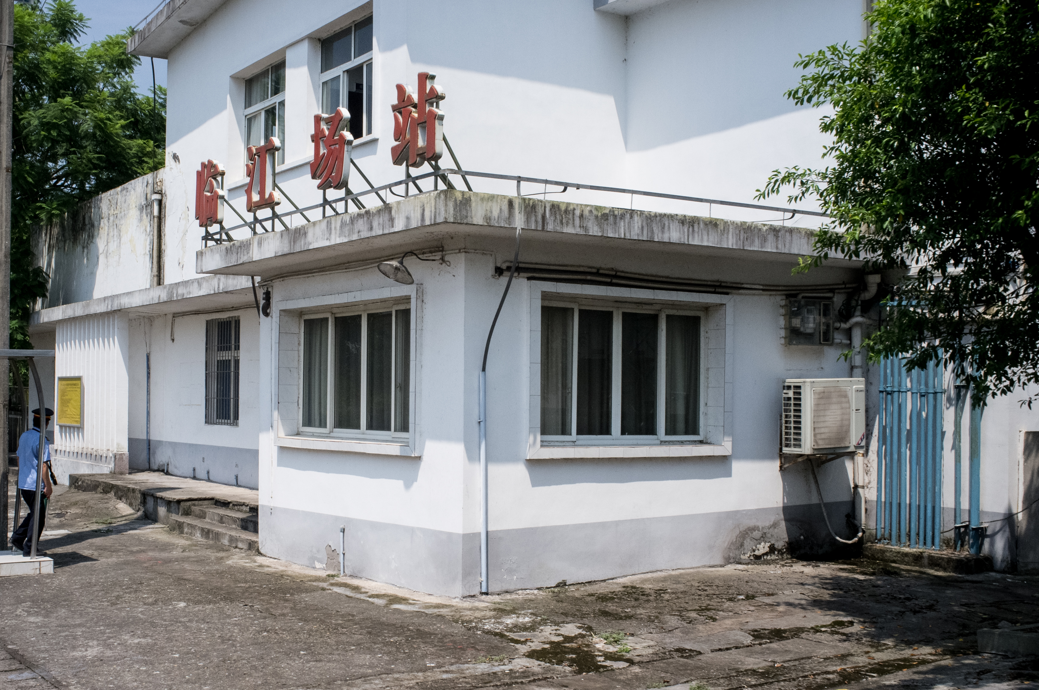 中文（中国大陆）: 成渝铁路临江场站